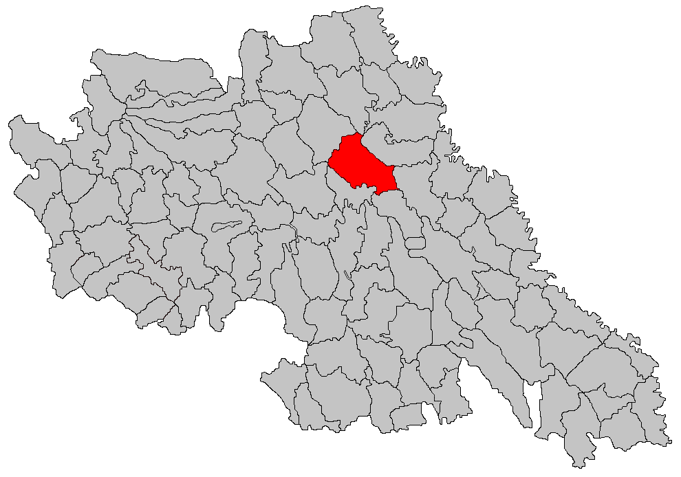 Categorie:Hărţi ale judeţului Iaşi